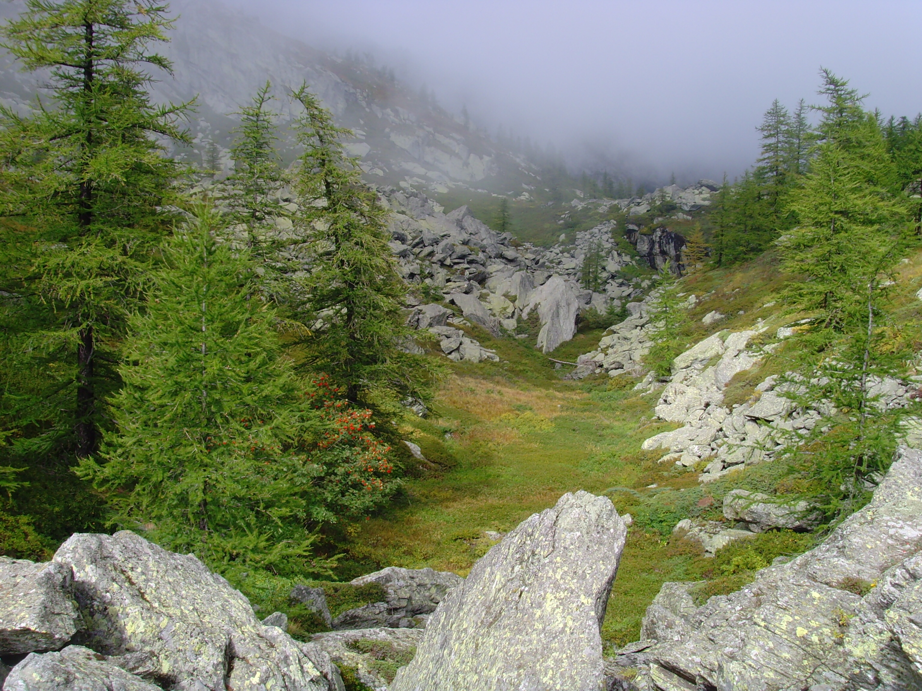 Forêt et tourbières granitiques du plateau de Mont-Cenis